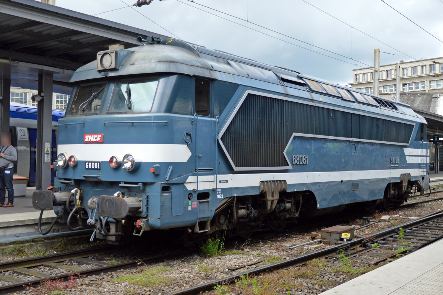 A1AA1A 68081 en gare d'Amiens.